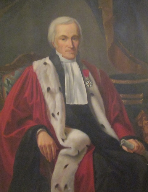 Portrait vers 1820. Collection particulière